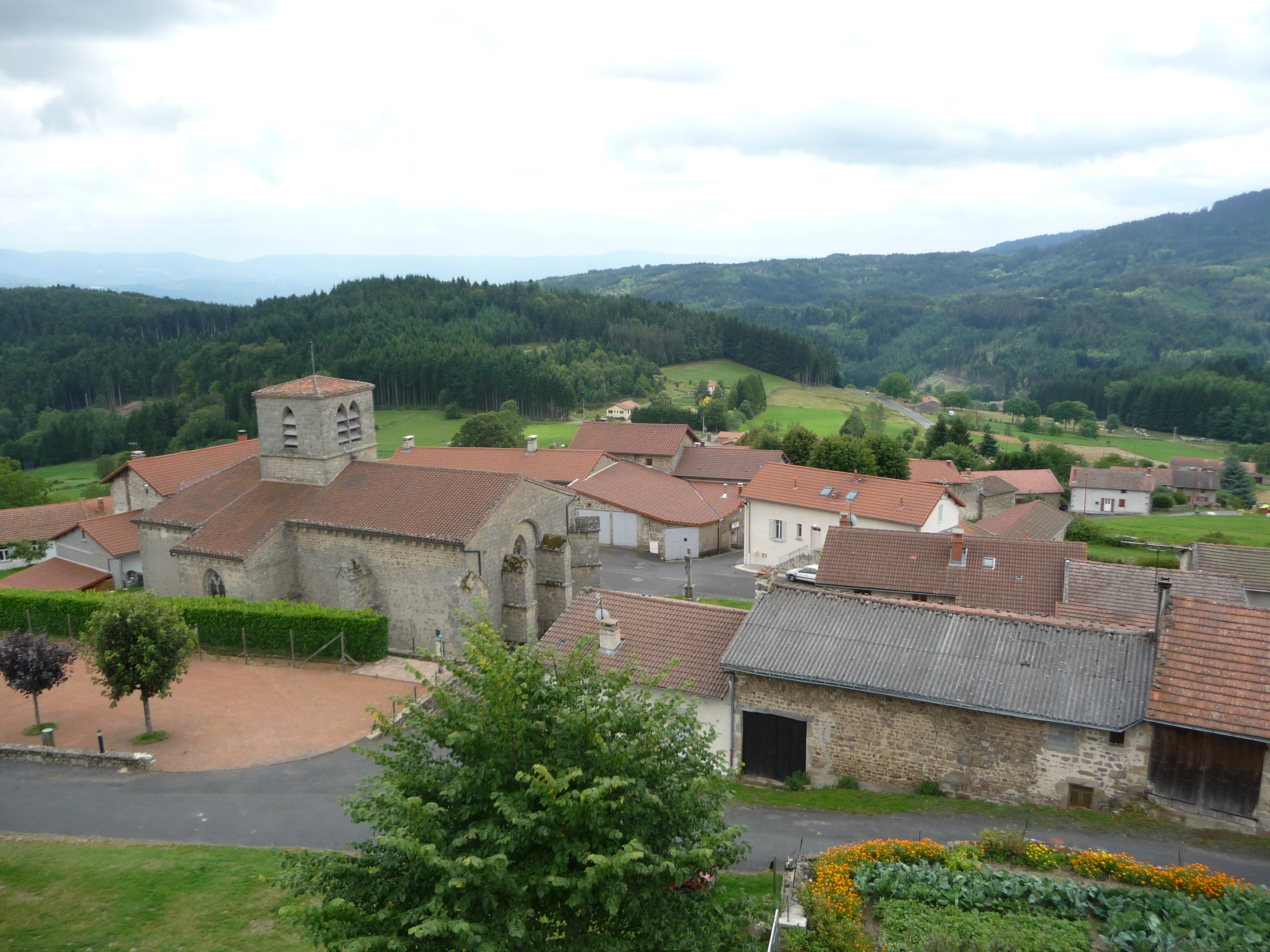 Vue de Le Monestier.